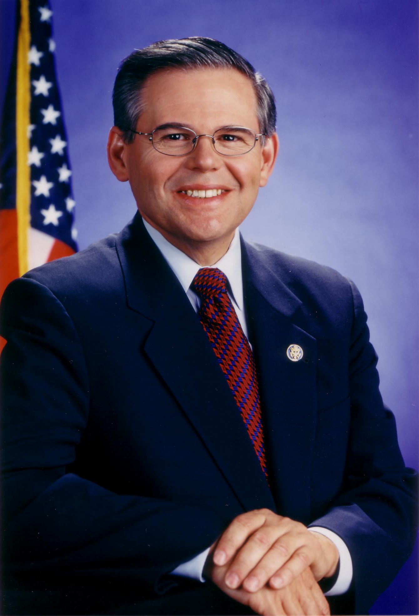 Robert Menendez, U.S. Senator from New Jersey.